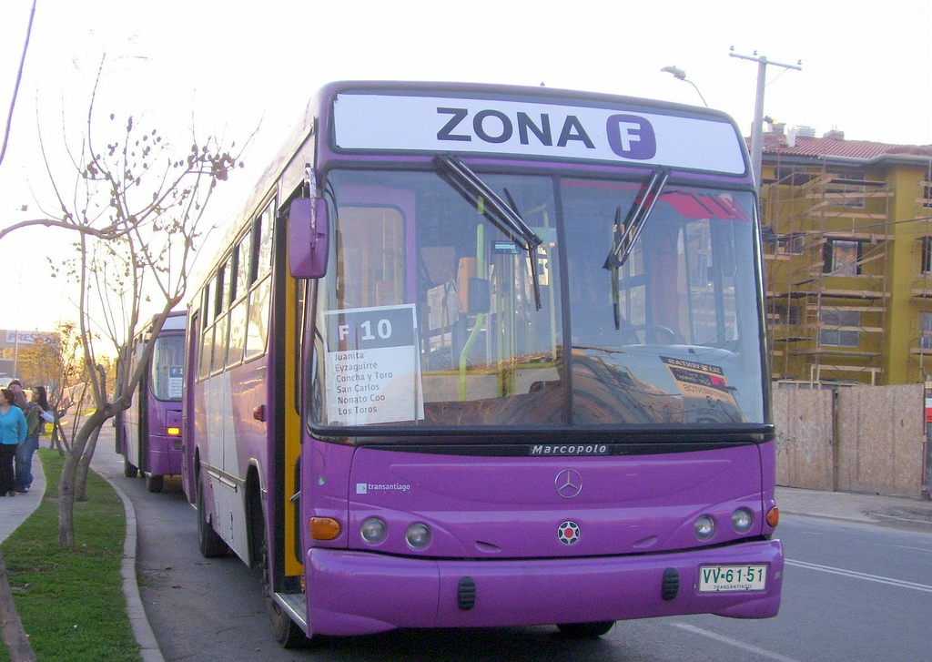 Fotografía del recorrido F10 de Transantiago. Comuna de Puente Alto, Santiago de Chile.